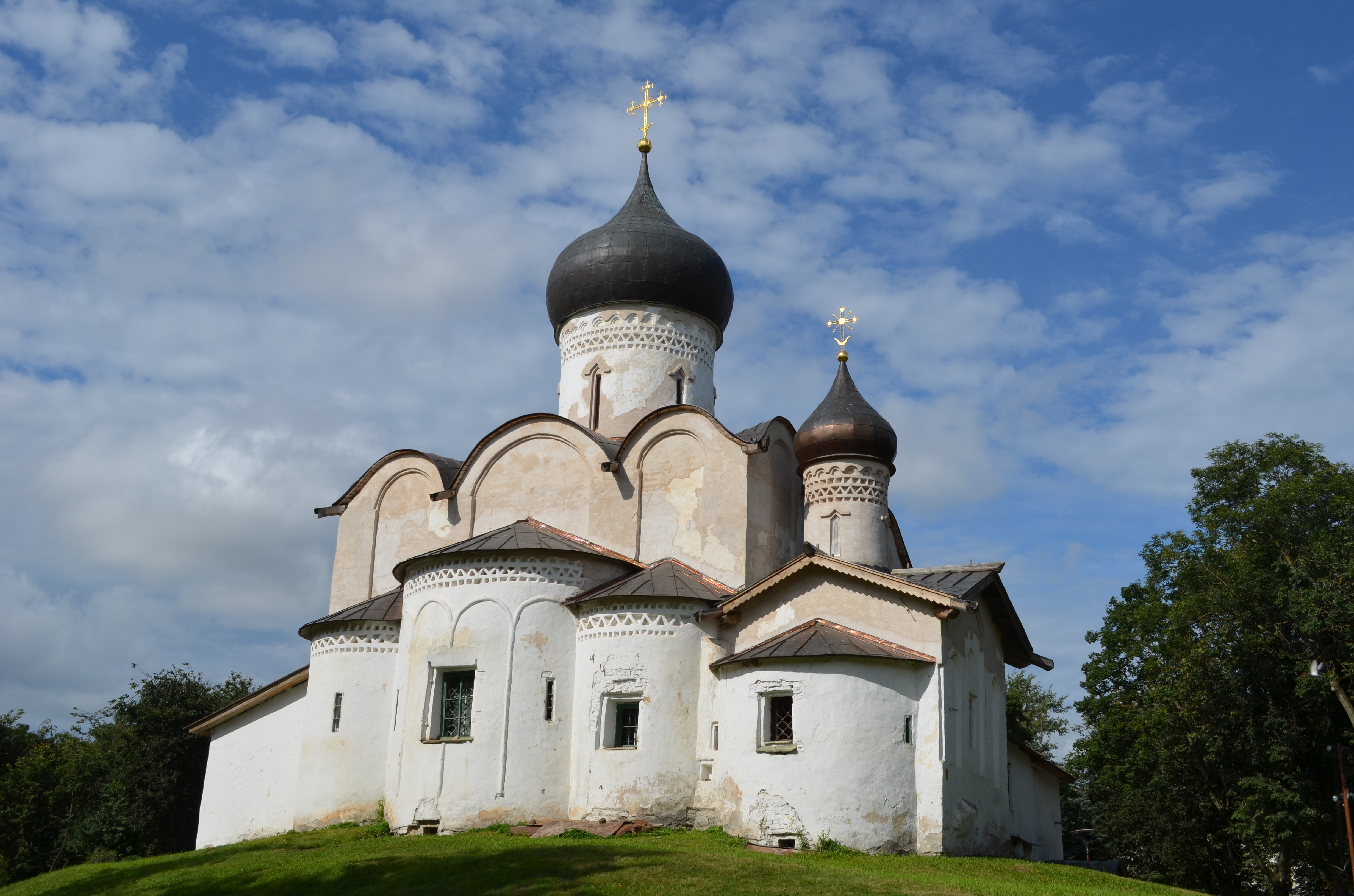 Церковь Василия "на Горке" (Псковская область, Псков, проспект Октябрьский, 5 (Пушкинская улица ))